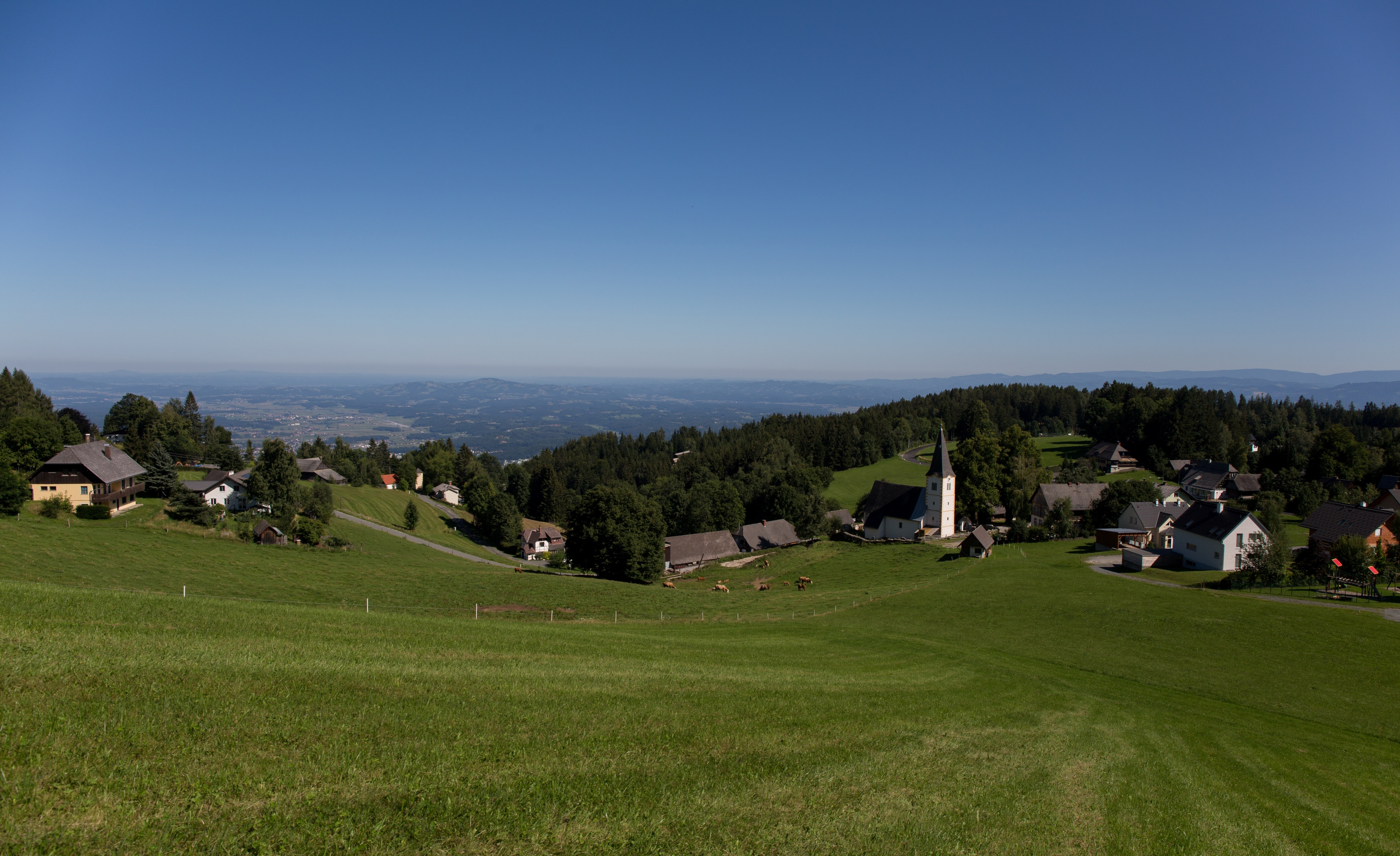 Trahütten in der Steiermark, Österreich